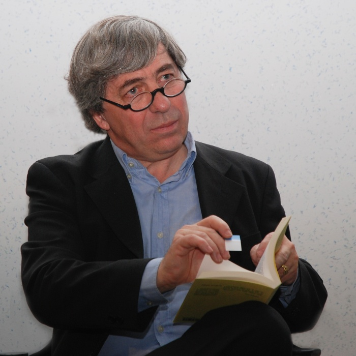 Portrait de Sorj Chalandon réalisé lors de la remise du prix littéraire Gabrielle d'Estrées le 5 décembre 2008 à la Médiathèque de Chambray-lès-Tours.